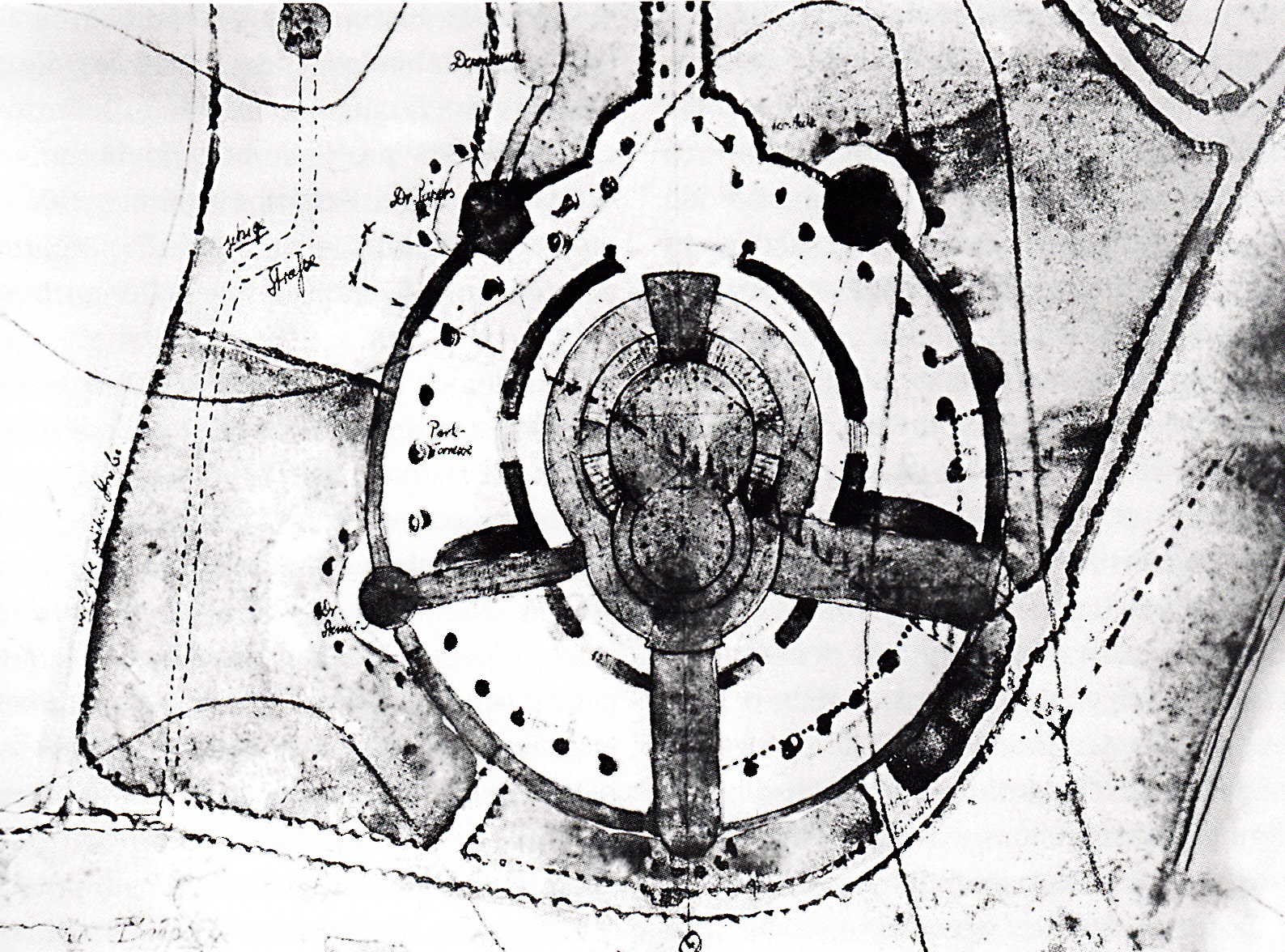 Nicht umgesetzter Geländeentwurf zum ersten Goetheanum